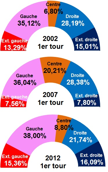 Résultats 1ers tours présidentielles Lannemezan